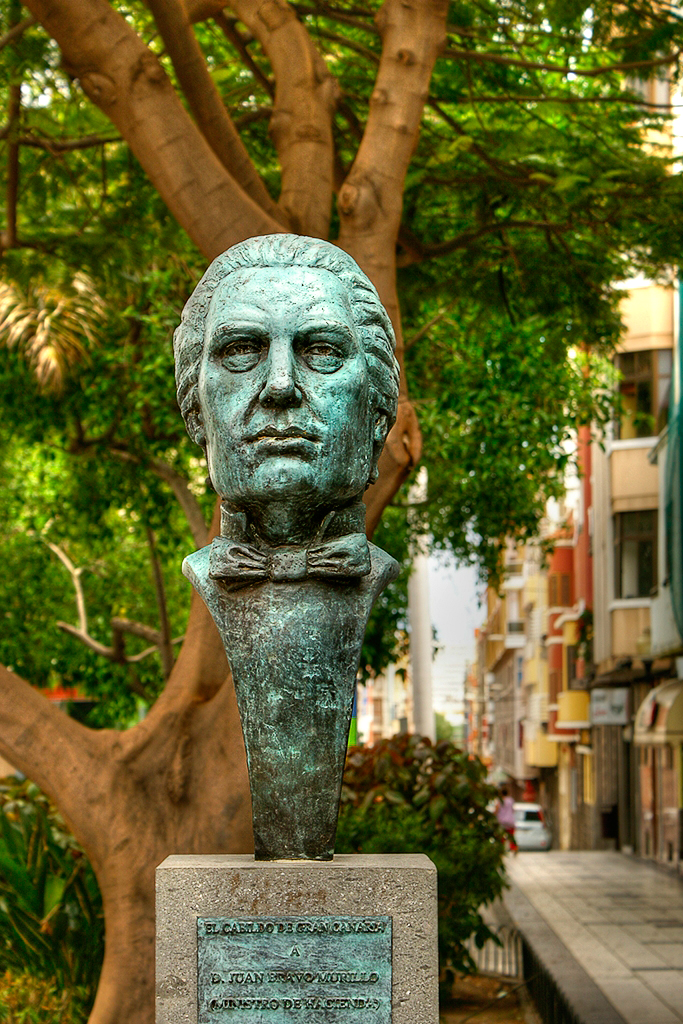 Busto del político madrileño situado en la calle Tomas Morales de Las Palmas de Gran Canaria (Islas Canarias, España). Fotografía pseudo-HDR con una sola JEPG. Para ver mejor la foto en grande aquí Sculpture of this politician from Madrid (Spain), that is situated at Tomas Morales street, in Las Palmas de Gran Canaria (Canary Islands, Spain). This is not a real HDR, is a single-JEPG RAW. For viewing in bigger size here